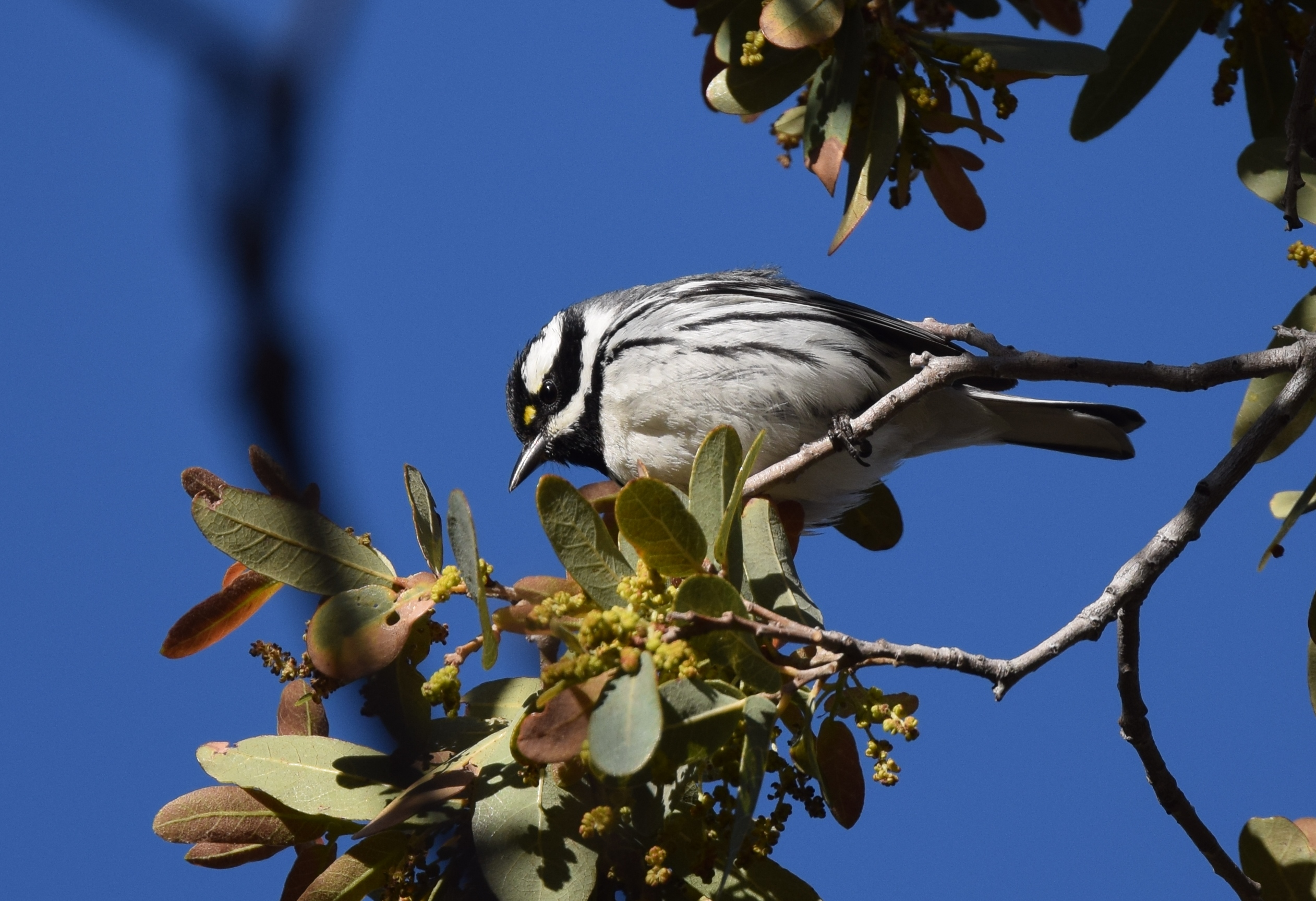 Day 4 4/1/17 Arizona